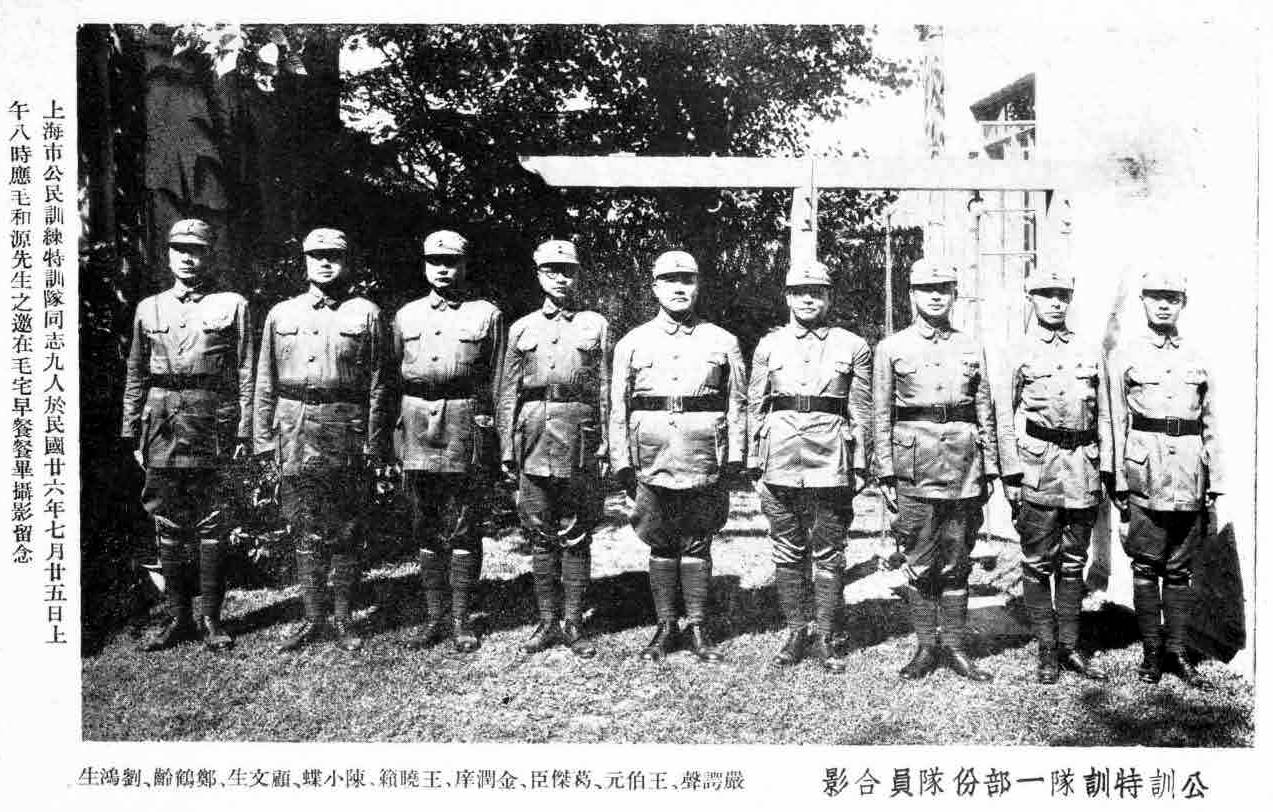 中文（台灣）: 上海市公訓同學紀念